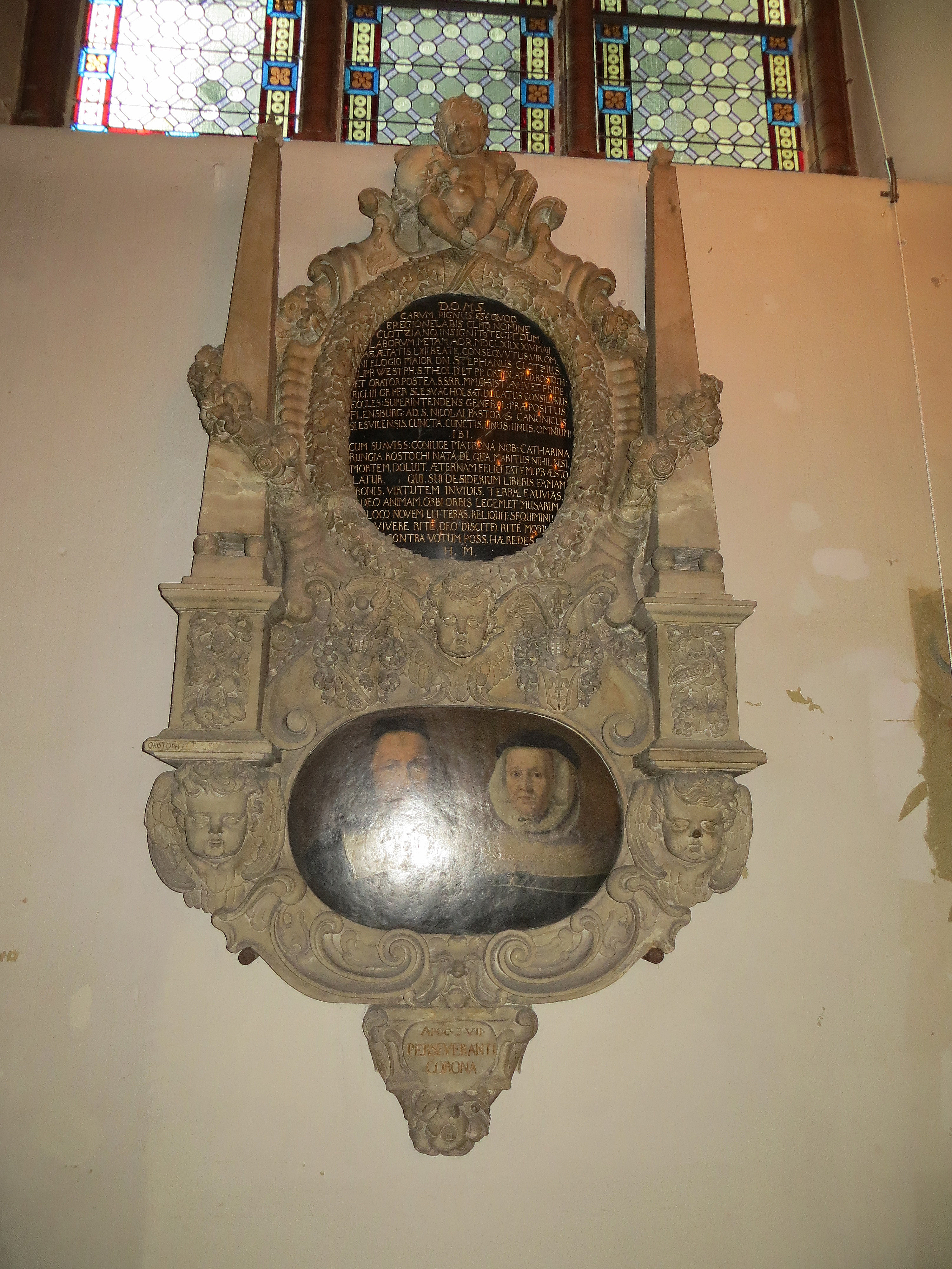 Epitaph für Generalsuperintendent Stephan Clotz und Frau, Bild 001